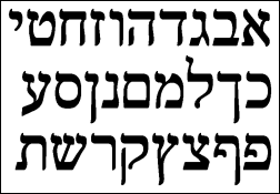 דוגמא לגופן "פרנק-ריהל" הגופן ששימש לדוגמא: Frank-Ruehl, של קולמוס.